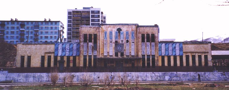 Южный вокзал (1992)